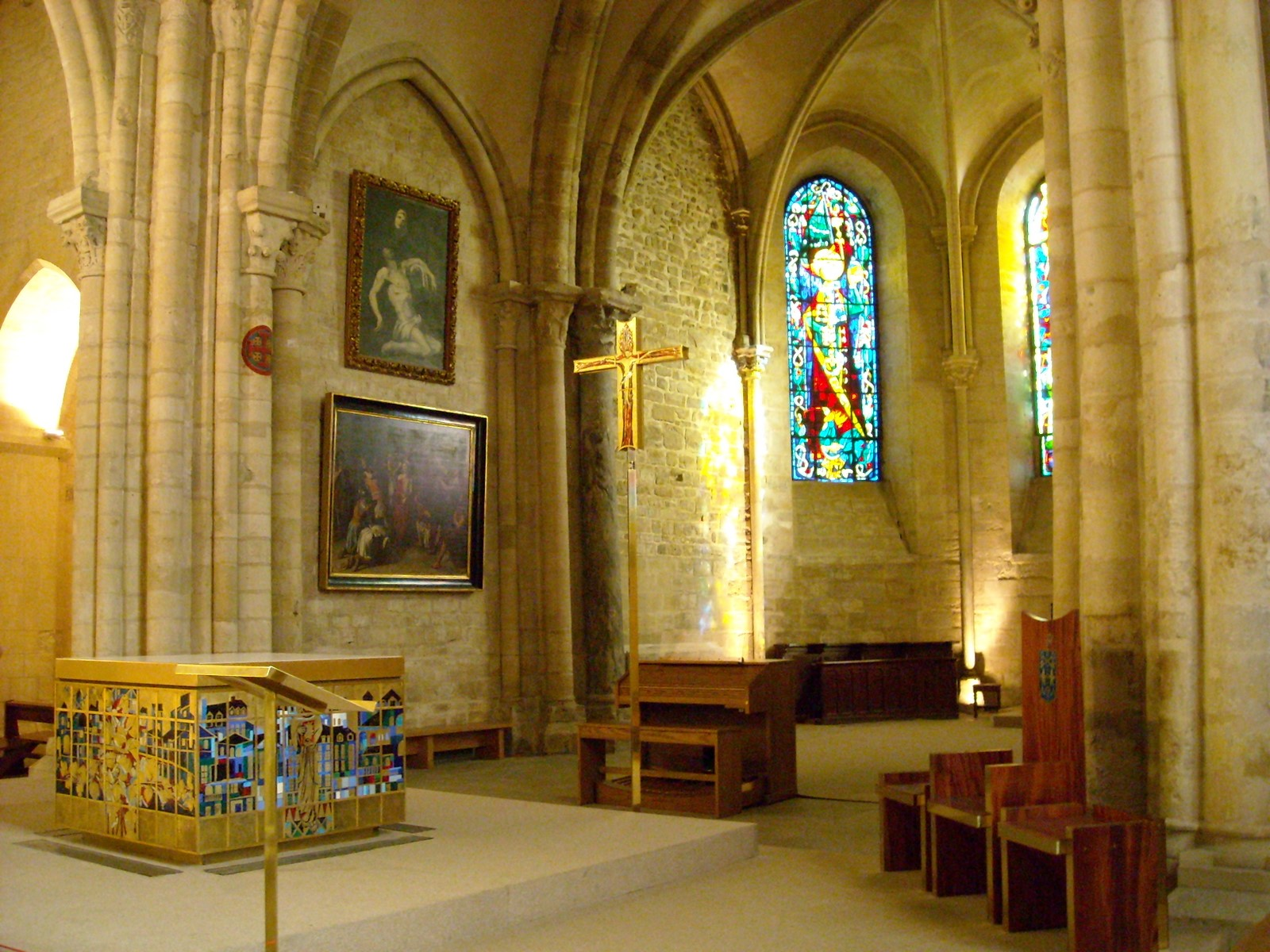 Chœur de l'église Saint-Pierre de Montmartre (Paris) avec son mobilier liturgique en cuivre et émaux de J-P Froidevaux (2005)